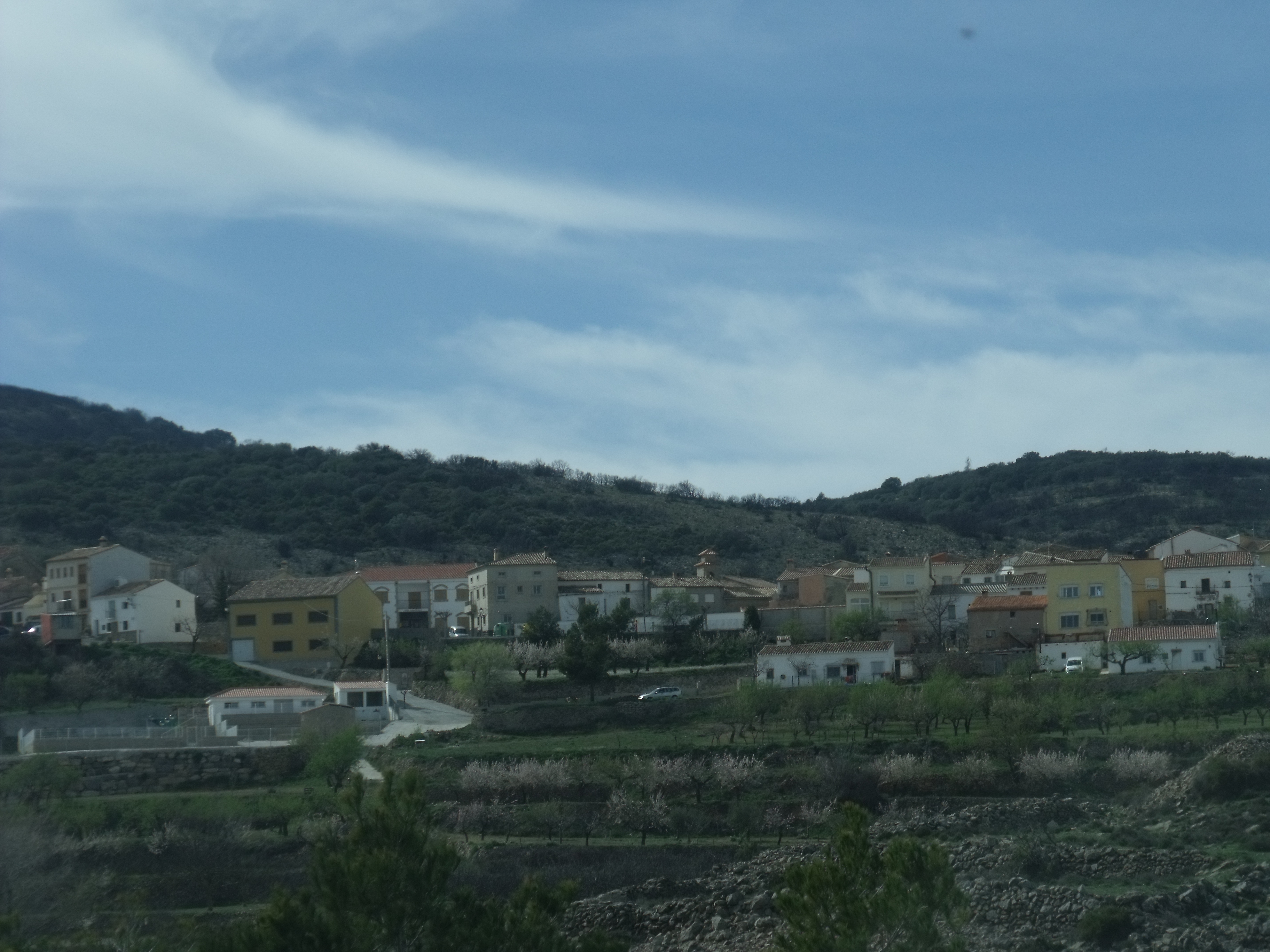 Vista general desde la carretera